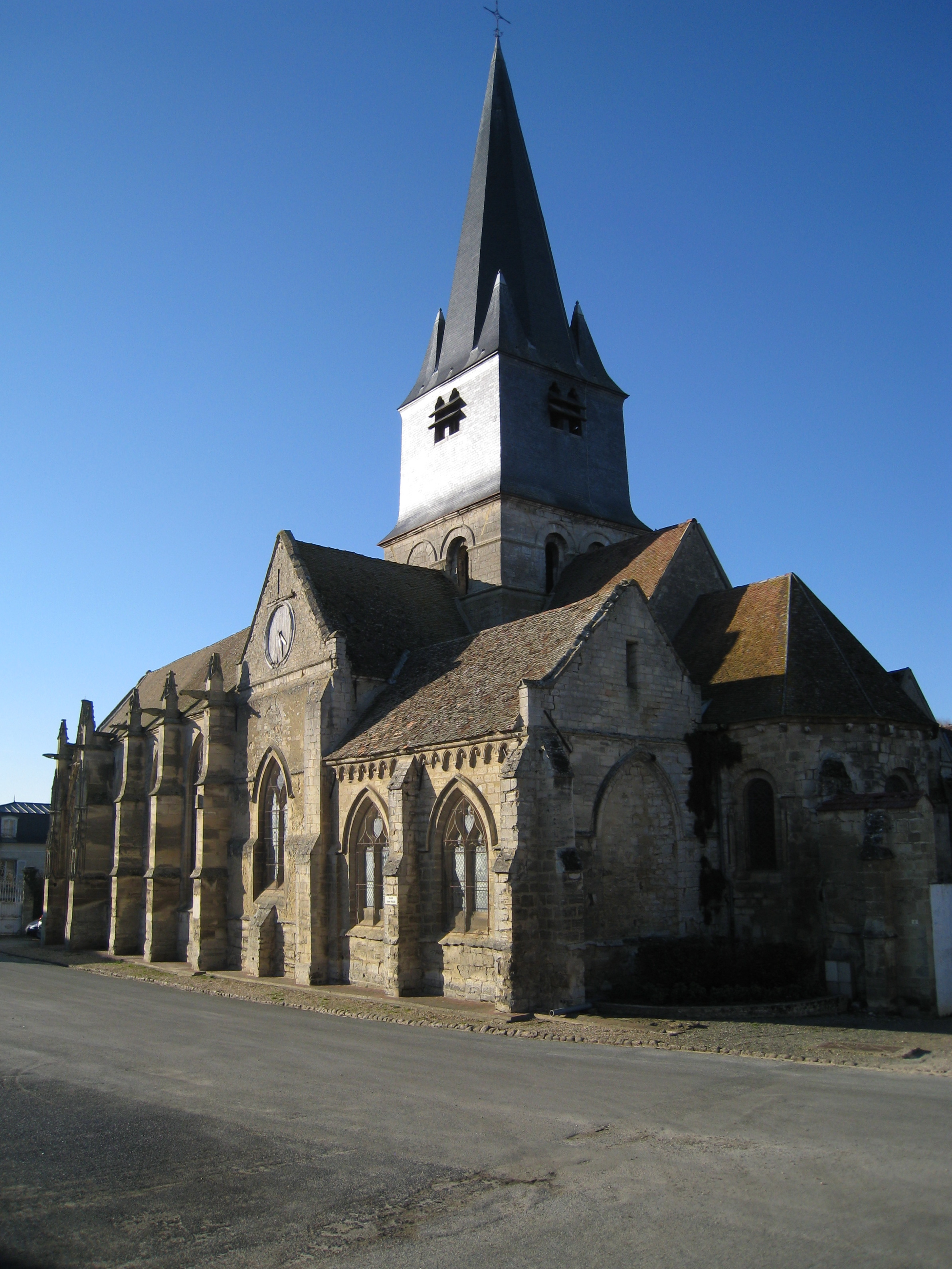 Église de Parnes, Oise, France